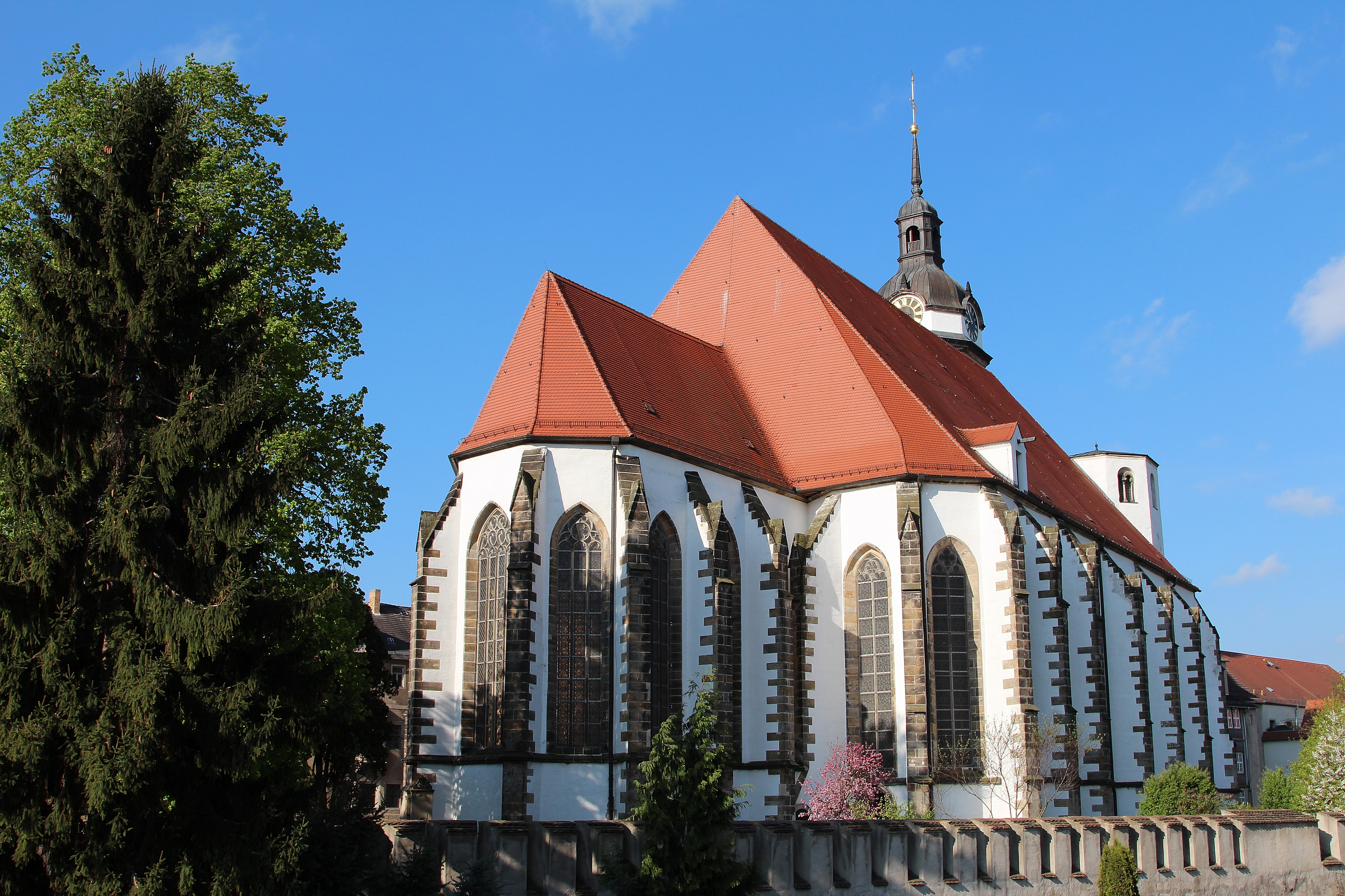 Torgau, Stadtkirche St. Marien